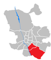 Situación de Vallecas en el mapa de distritos de Madrid